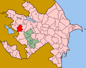 Map of Azerbaijan showing Dashkasan (Daşkəsən) rayon.